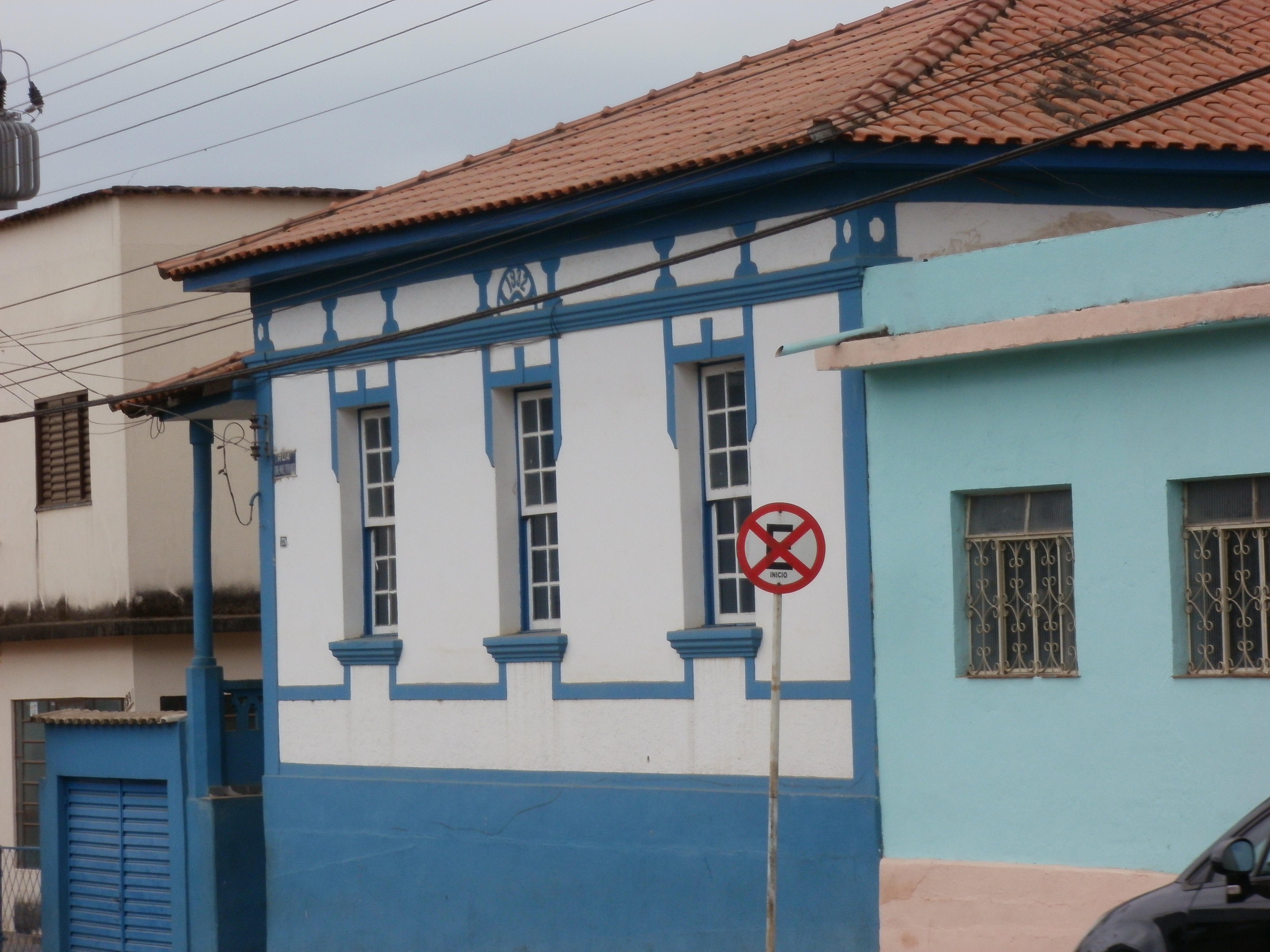 Vista de uma casa em Bom Jardim de Minas-MG, Brasil.